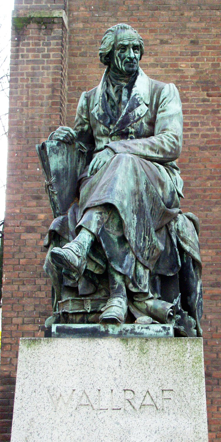 Sitzfigur Ferdinand Franz Wallraf